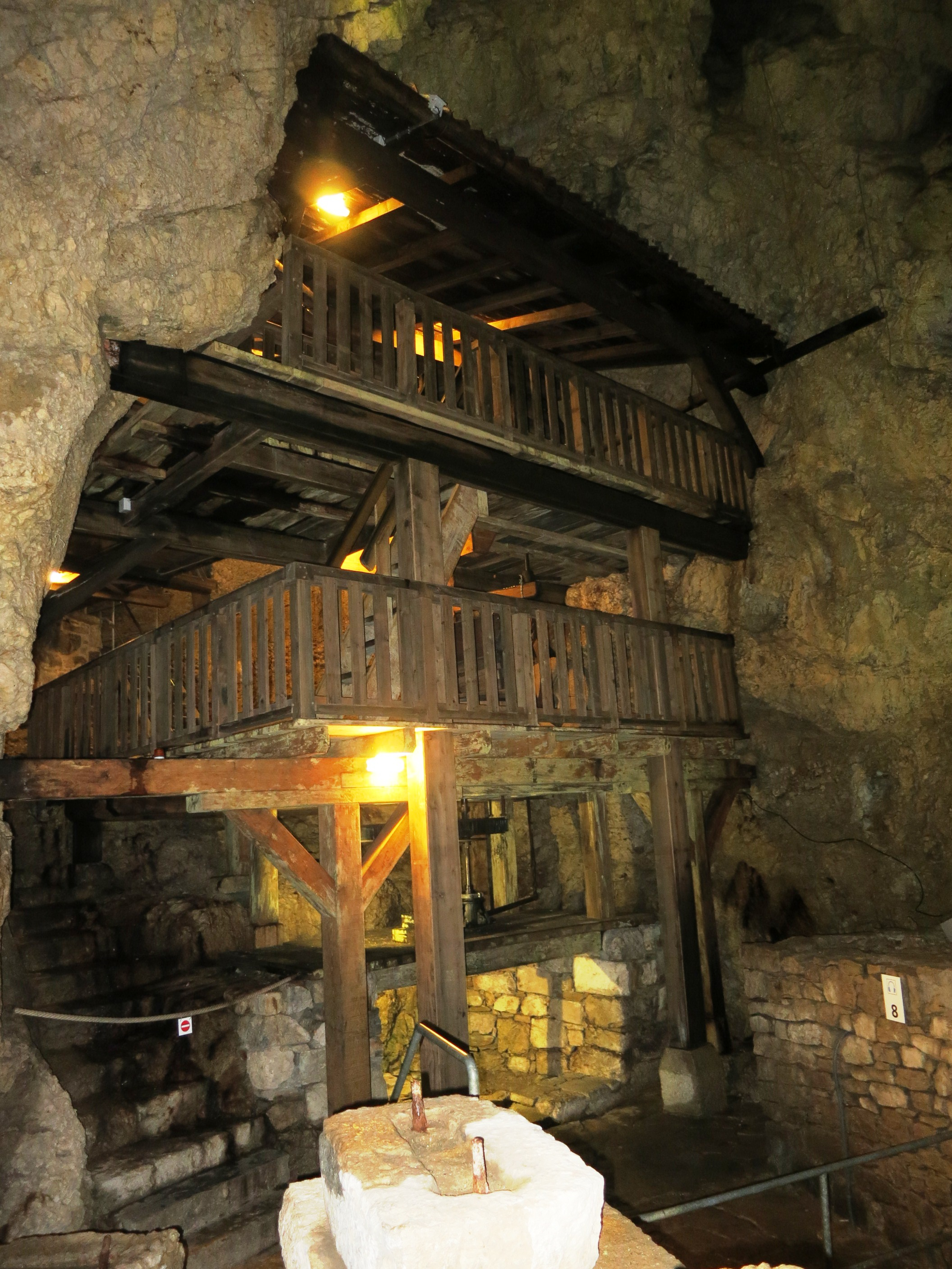 Unterirdische Mühlen, Col-des-Roches, Le Locle, Schweiz